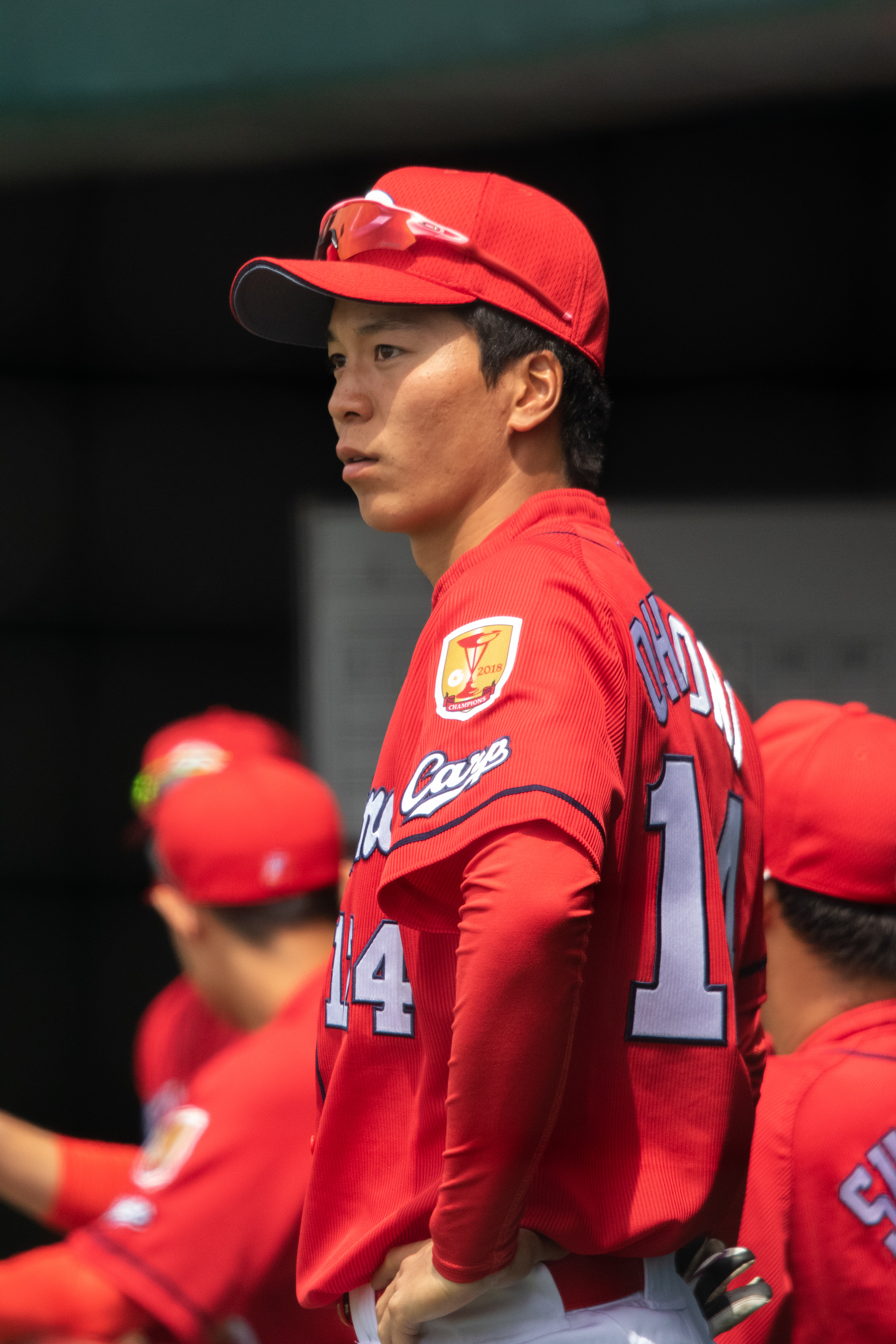 2019/4/16 タマホームスタジアム筑後